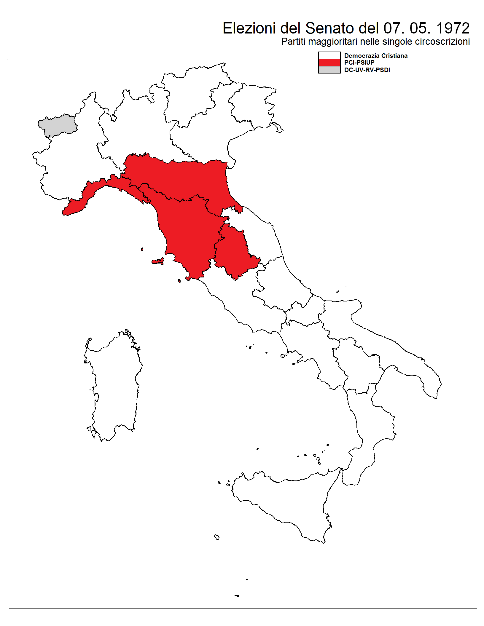 Partiti maggioritari nelle elezioni 1972 nelle singole circoscrizioni.